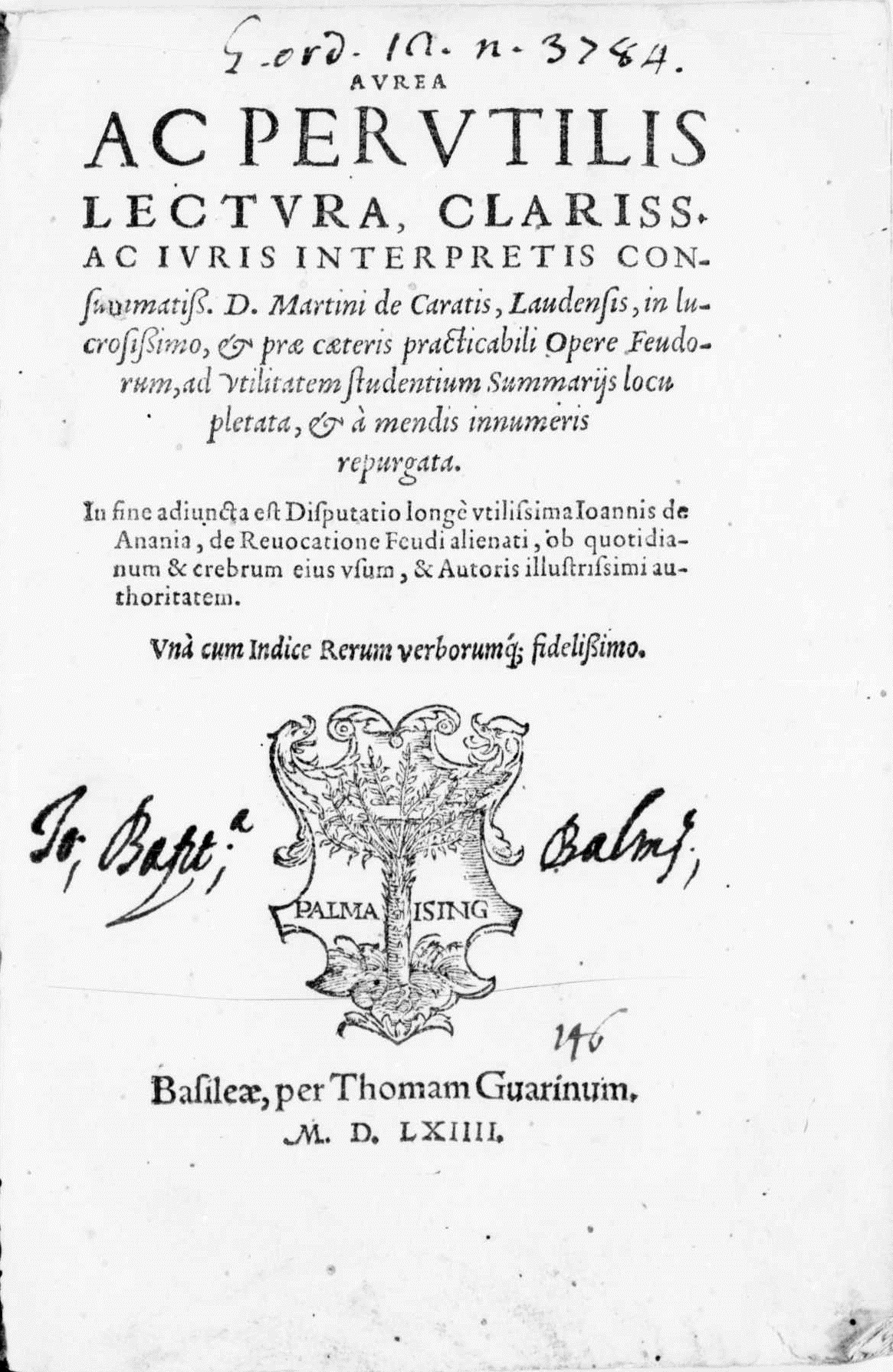 Frontespizio